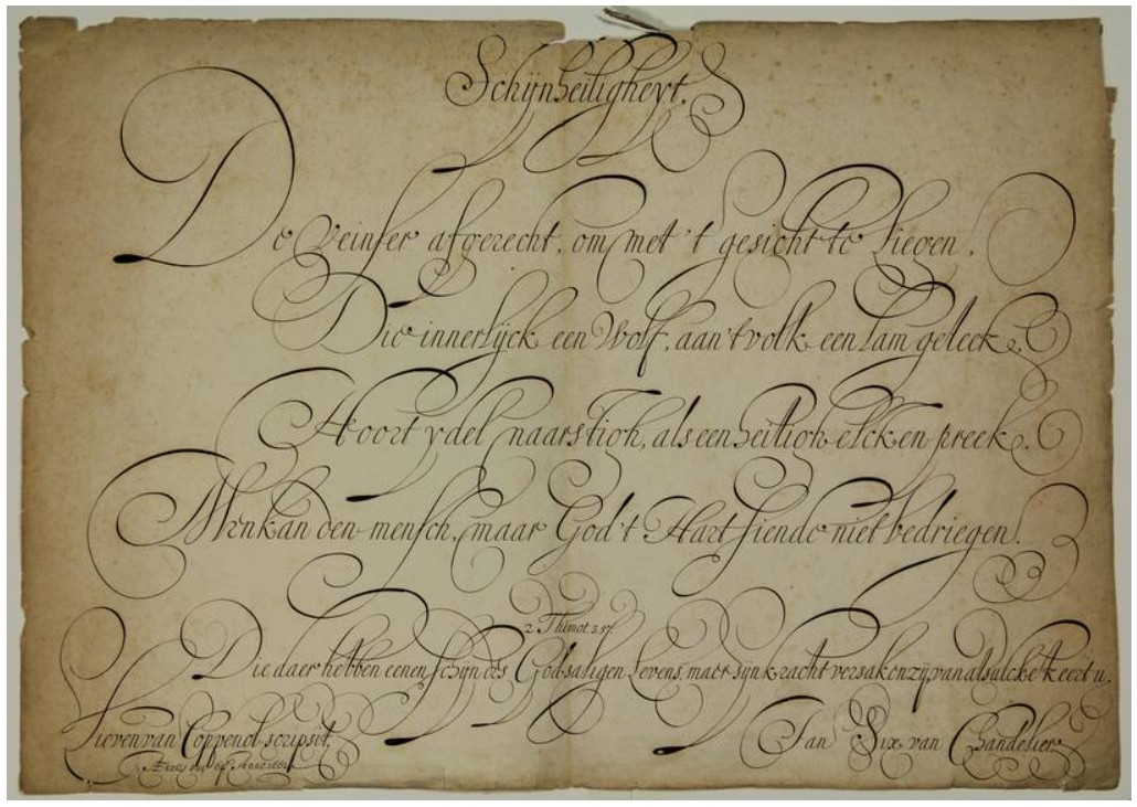 Schijnheiligheyt. / De veinser afgerecht, om met 't gesicht te liegen,/ Die innerlijck een wolf, aan 't volk een lam geleek, / Hoort ydel naarstigh, als een heiligh elcken preek. / Men kan den mensch, maar God 't Hart siende niet bedriegen / 2 Thimot. 3.5. / Die daer hebben eenen schijn des Godsaligen levens, maer sijn kracht versaken zij, van alsulcke keert u. / Lieven van Coppenol scripsit. / Aetatis suae 64 Anno. 1662 Jan Six van Chandelier